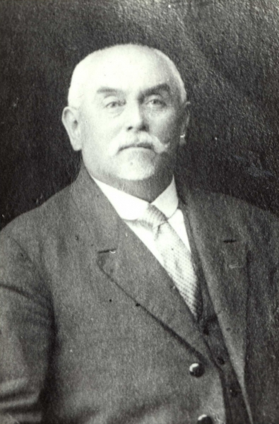 Hércules Galló